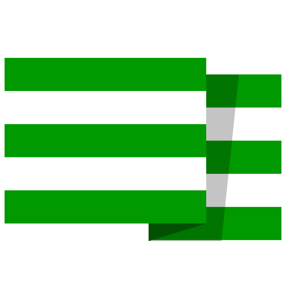 Bandera de Tutazá Boyacá Colombia